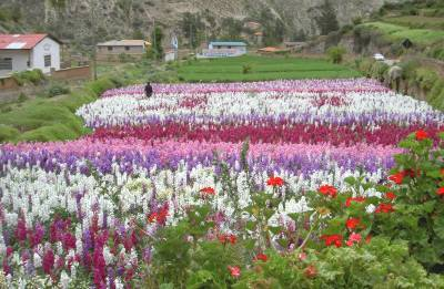 Campiña de flores